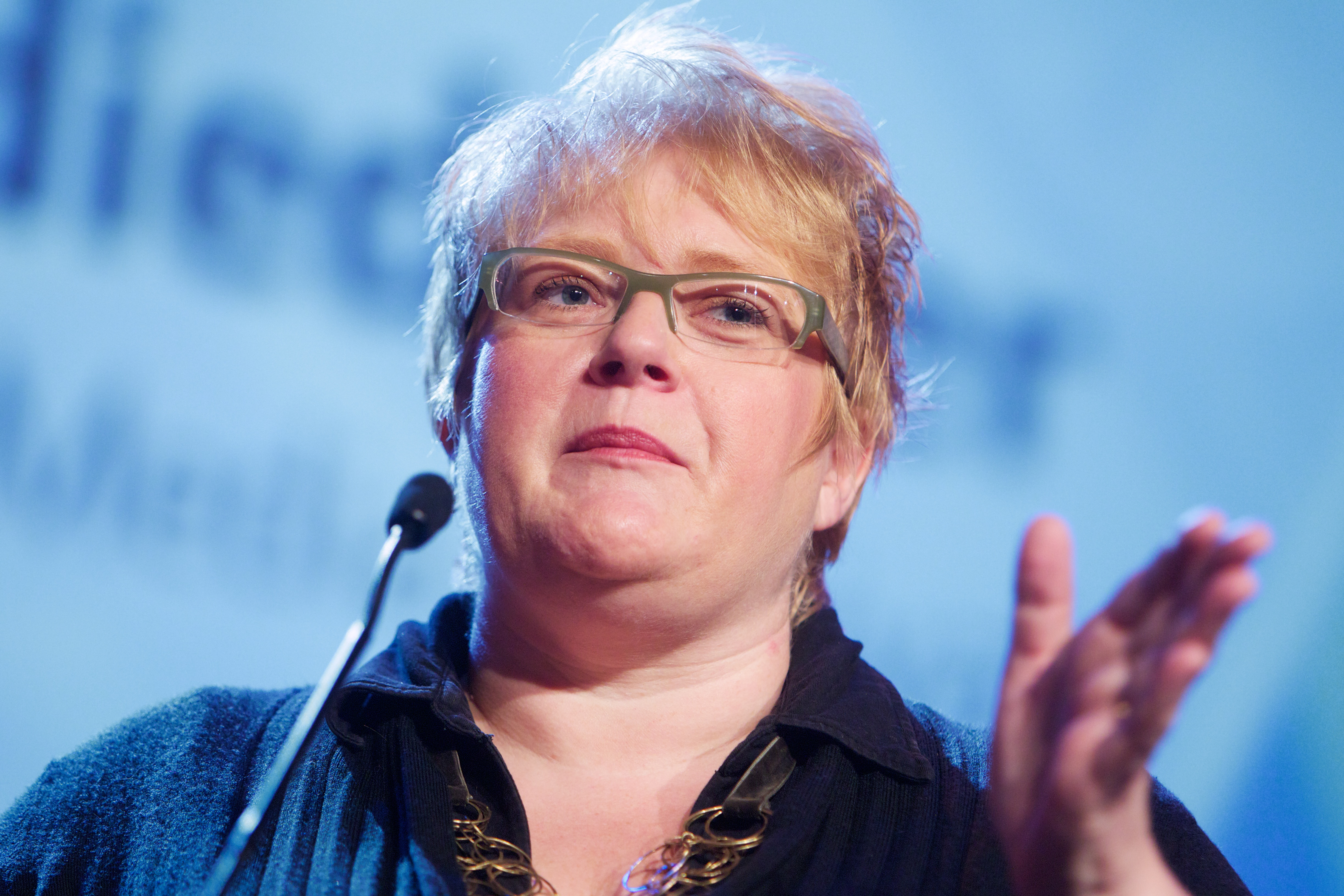 Bergen, 20110512. Nordiske Mediedager, torsdag. Trine Skei Grande . Foto: Eirik Helland Urke